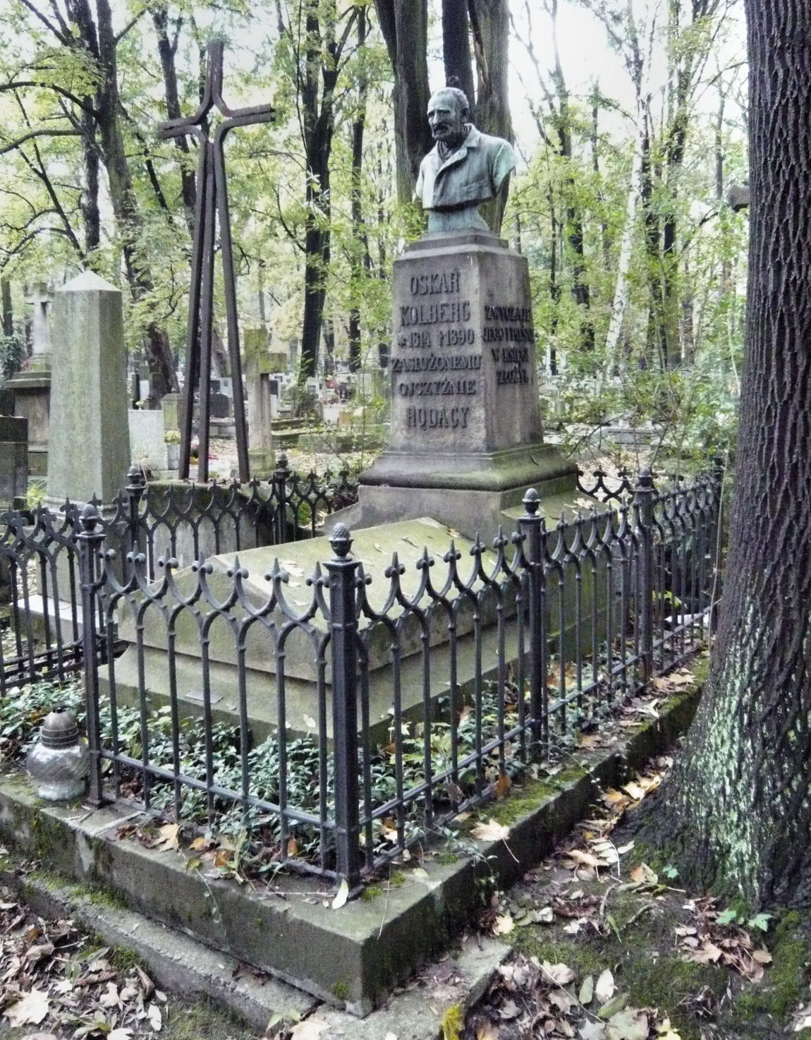 Grób Oskara Kolberga Cmentarz Rakowicki w Krakowie.